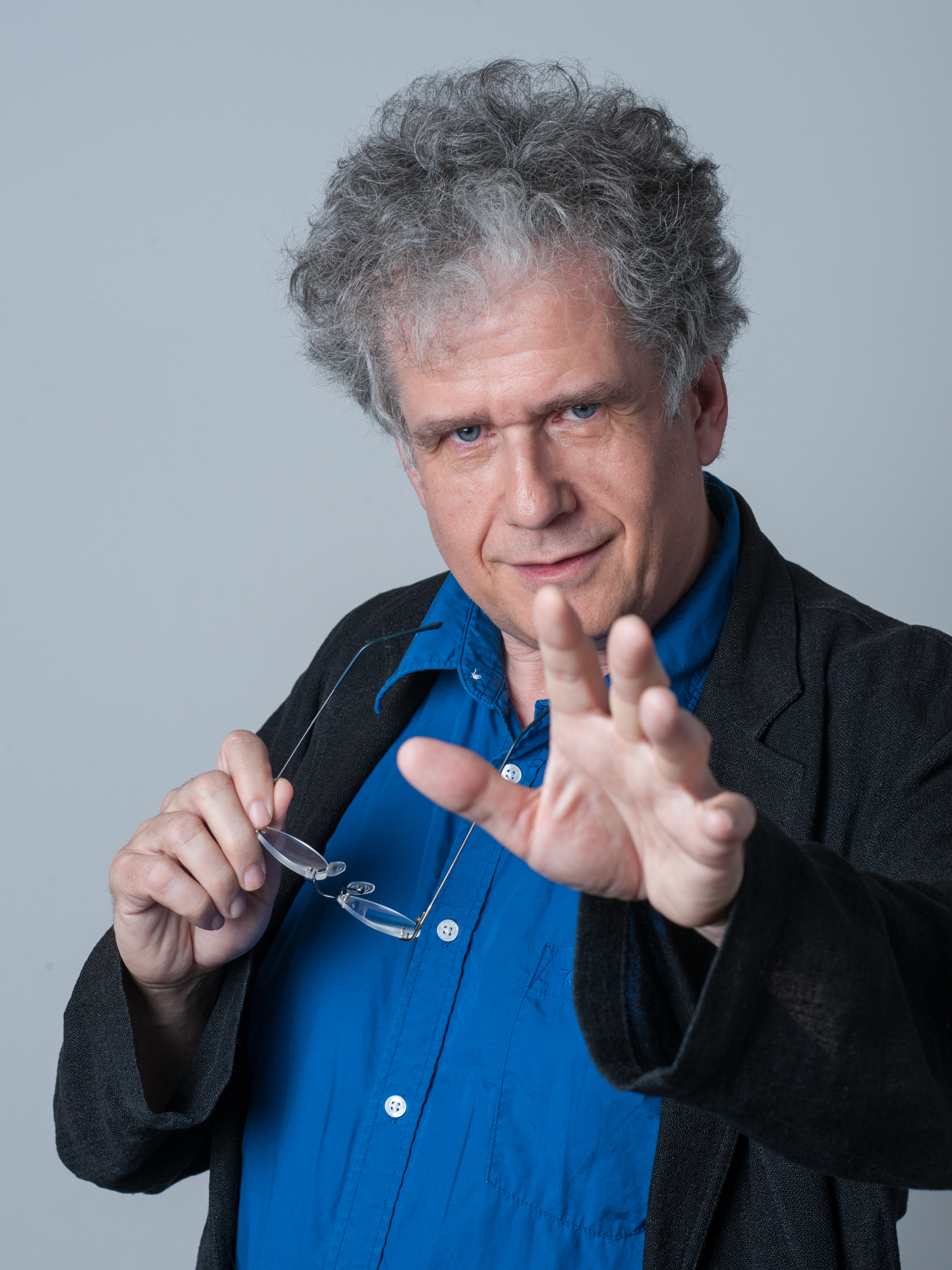 Fotoprojekt Österreichischer Film 2016: Regisseur Martin Polasek